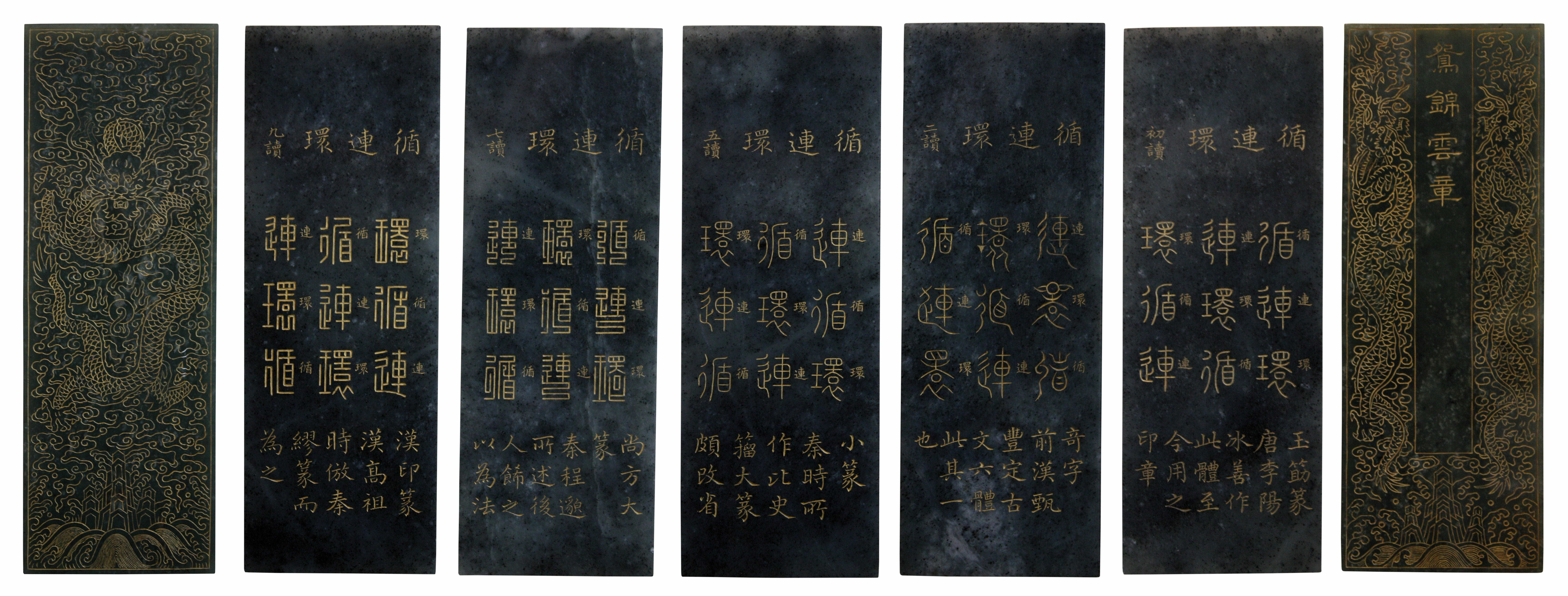 Jade book, Qing dynasty, Qianlong period